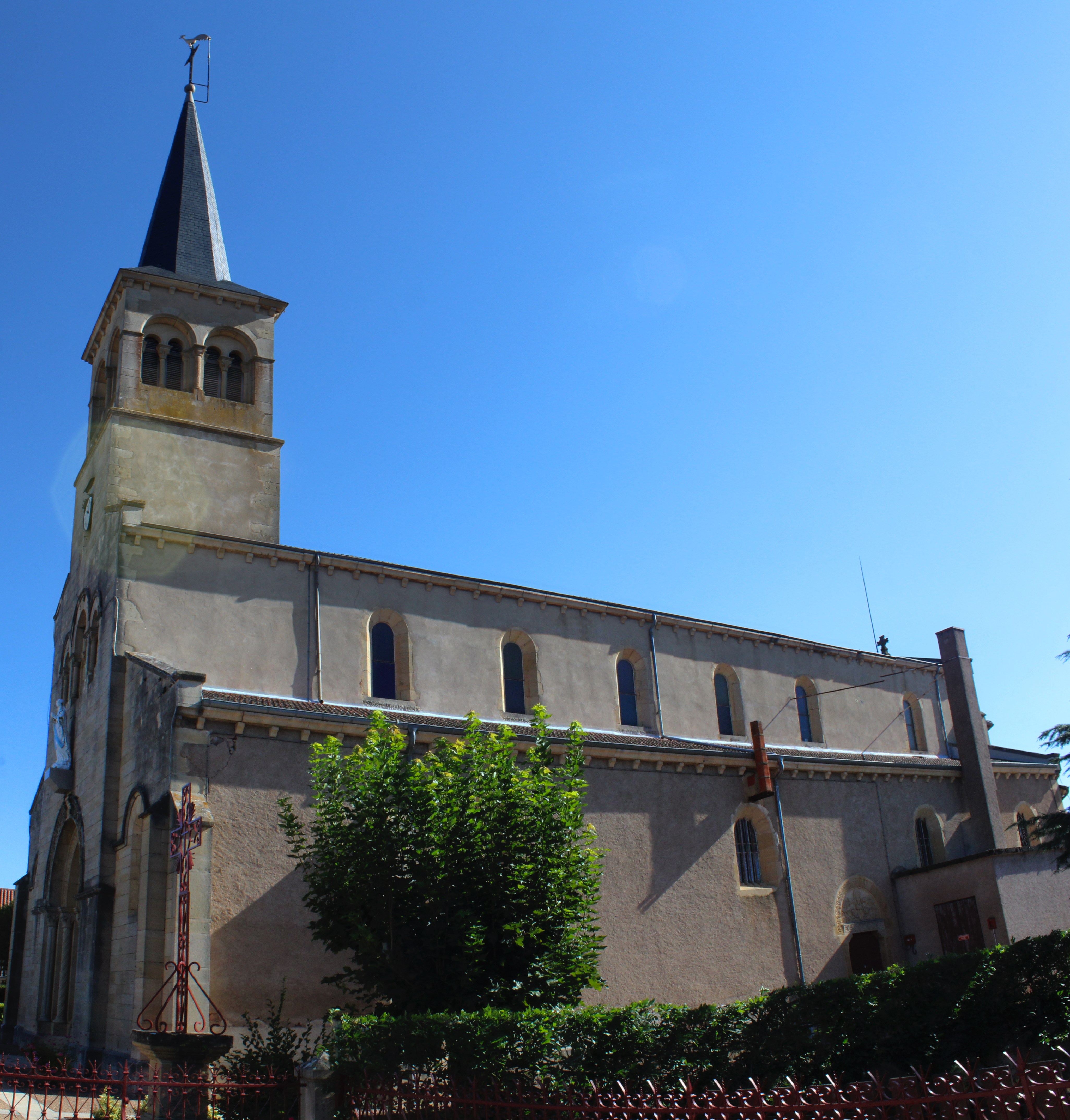 Église Saint-Symphorien de Chassigny-sous-Dun.